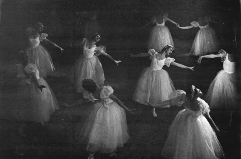 Budapest, II. Weltfestspiele, "Ballett der sowjetischen Jugend" Von den Veranstaltungen anläßlich der Budapester Weltjugendfestspiele im August 1949-Während der Jugendfestspiele in Budapest führten allabendlich junge Menschen der einzelnen Nationen in den Theatern der Hauptstadt Tänze, Chorgesänge und musikalische Darbietungen aus ihrer Heimat vor. UBz: Ballett der sowjetischen Jugend.Foto:Illus August 49